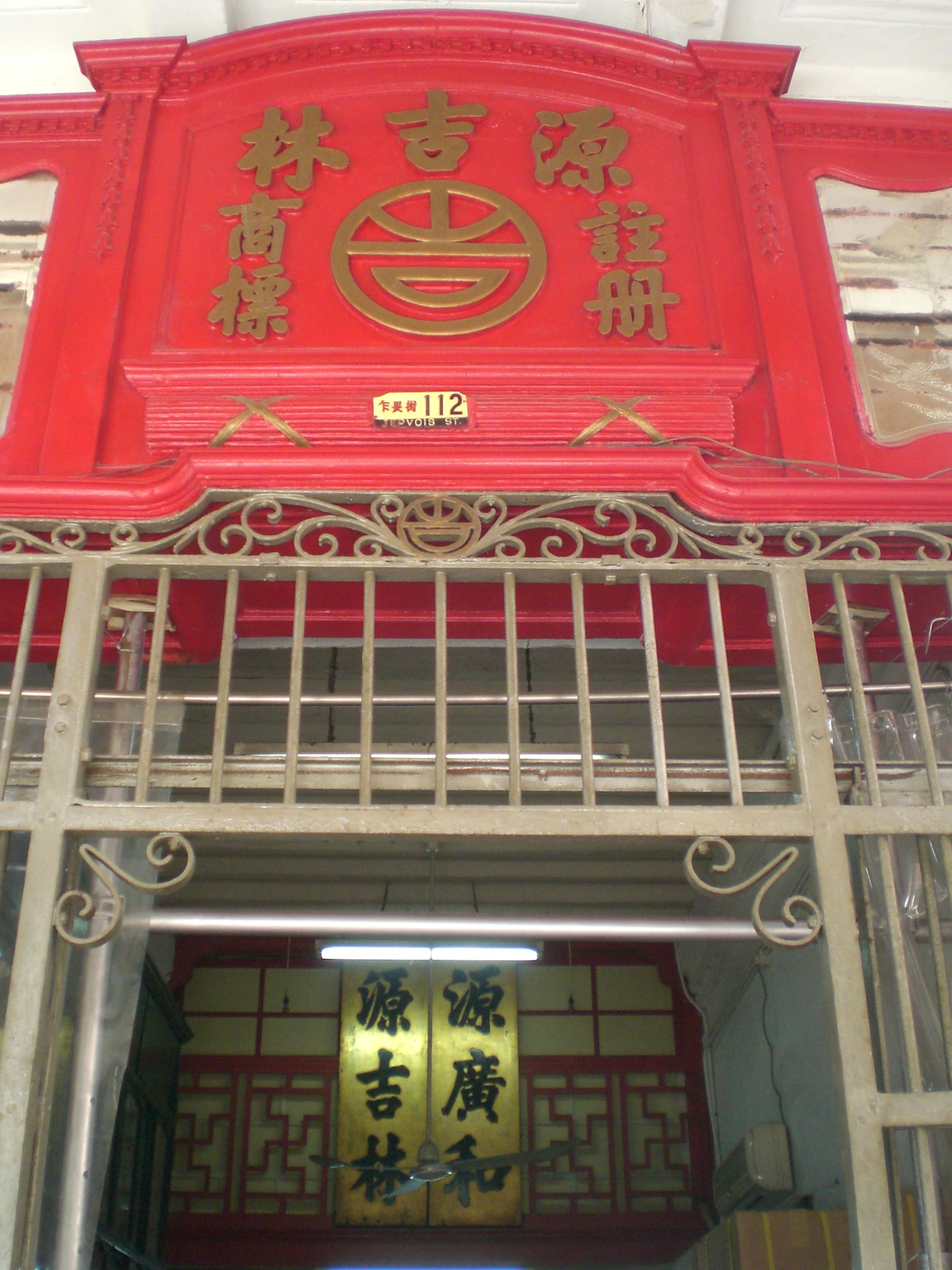 上環蘇杭街